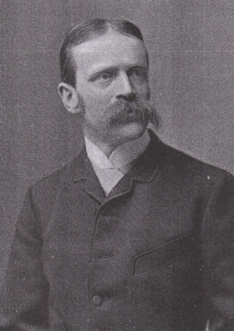 Fritz von Uhde (1848-1911), german painter